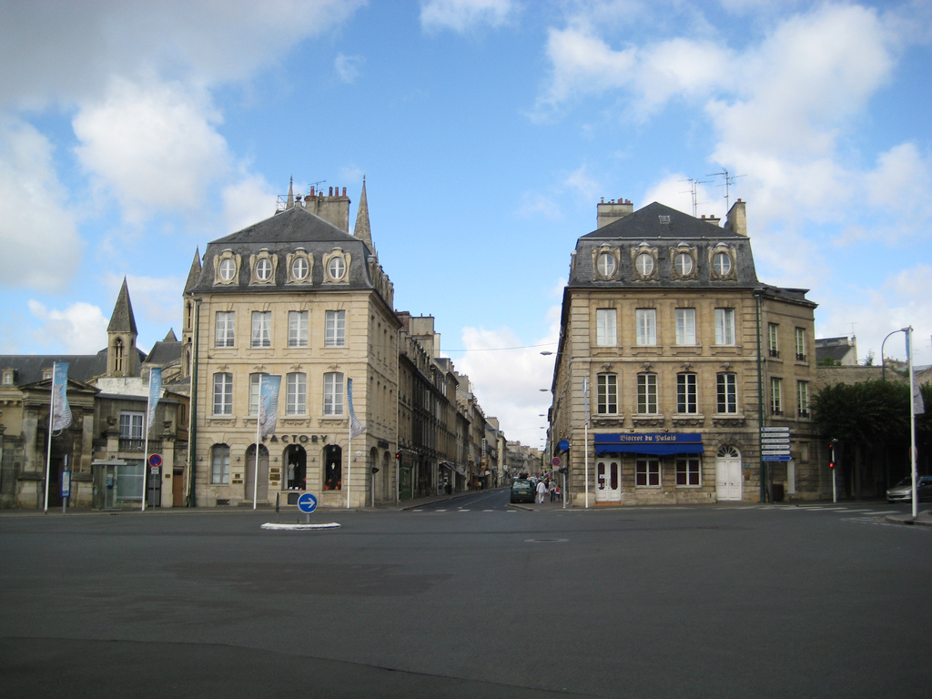 Pavillons de la place Fontette à l'entrée de la rue Guillaume le Conquérant à Caen (Calvados)